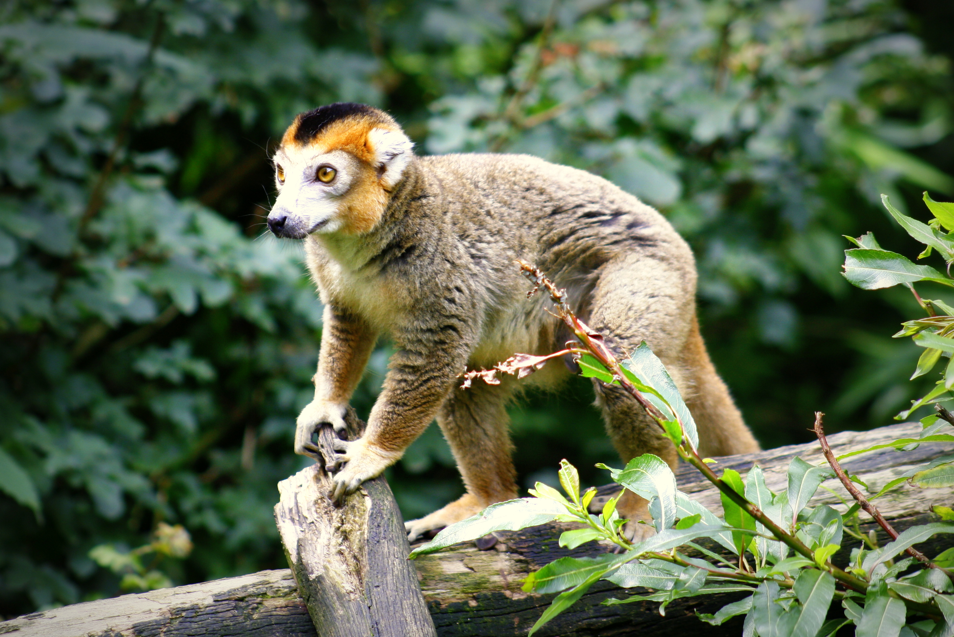 kroonmaki, foto genomen in Apenheul, Apeldoorn, Nederland